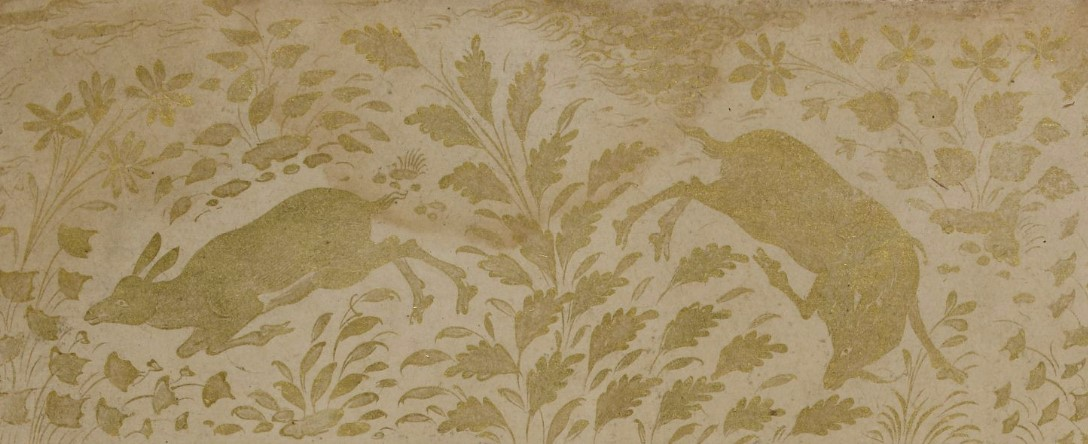 1539-1543 Xəmsə Əlyazmasının bədii tərtibatı, Mirzə Əli